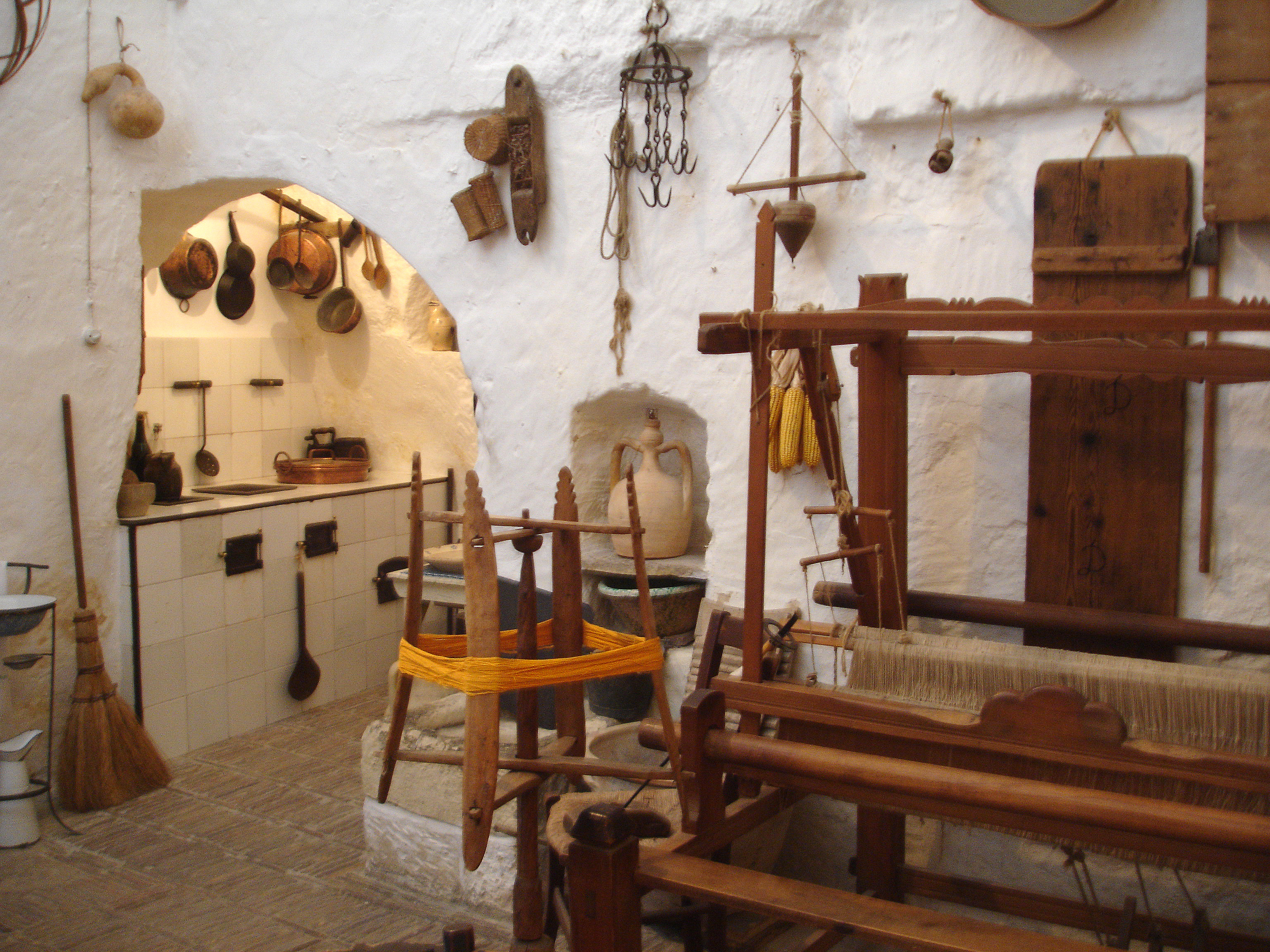 Interno della casa-grotta, museo a Matera